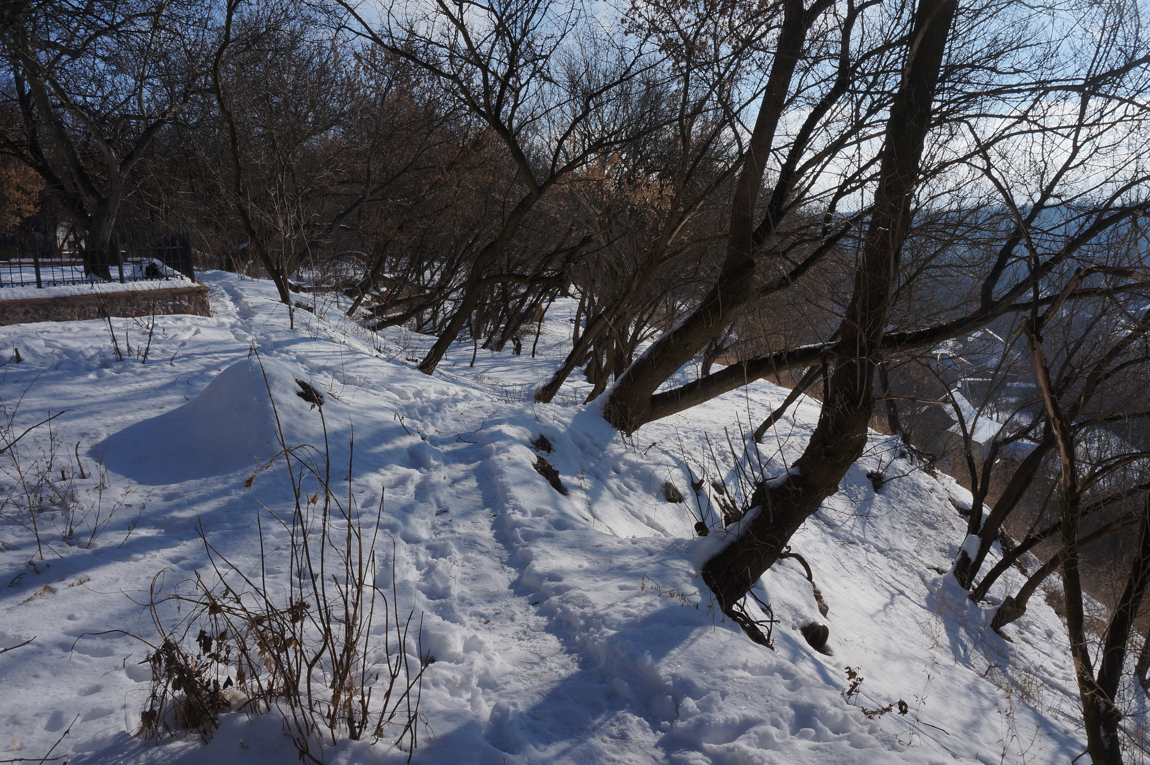 окольний град, поселення, Житомир, Замкова гора, в межах вулиць Замкова, Кафедральна та Замкової площі